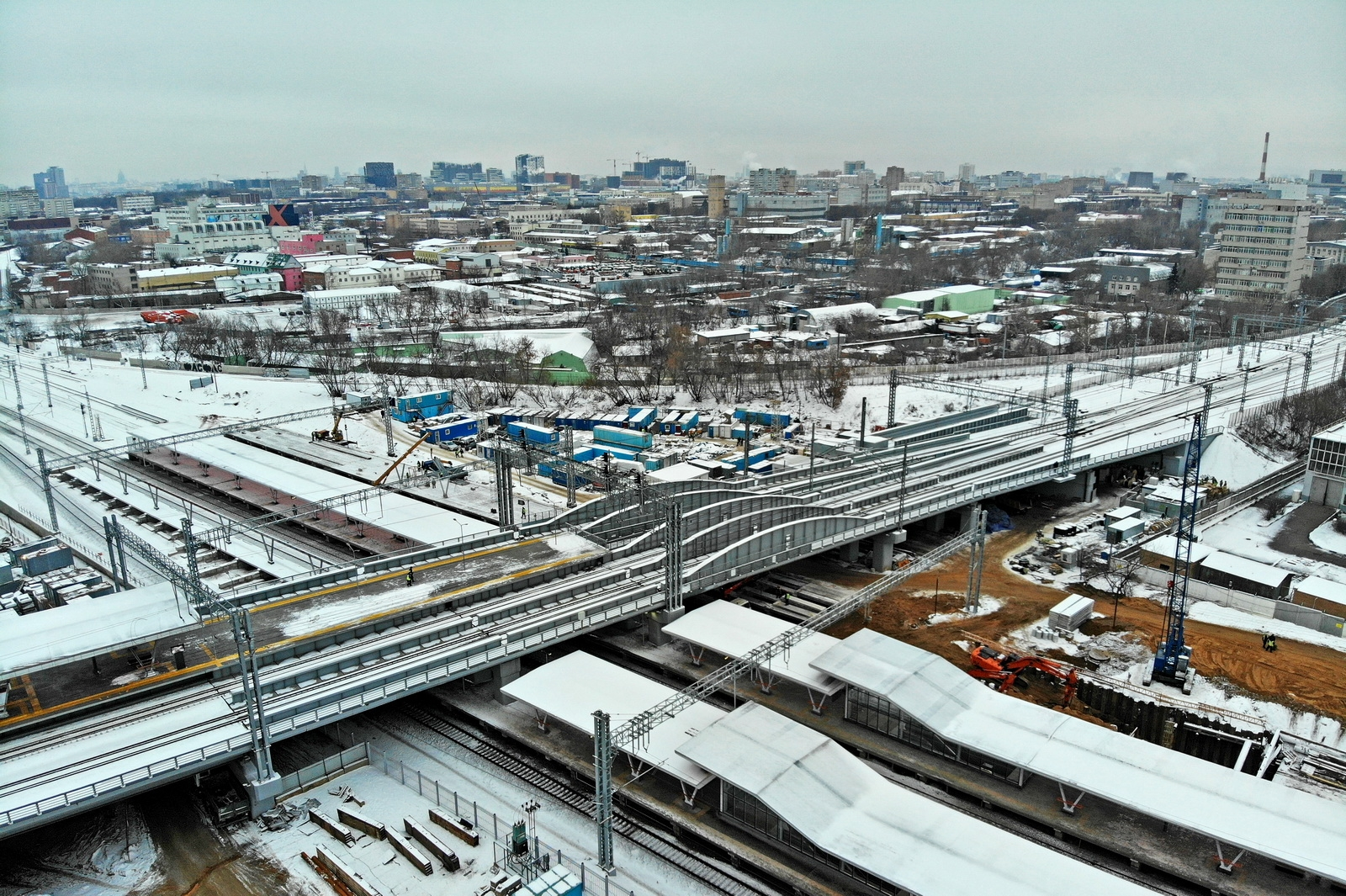 Строительство станции метро «Нижегородская» Некрасовской линии (декабрь 2018)